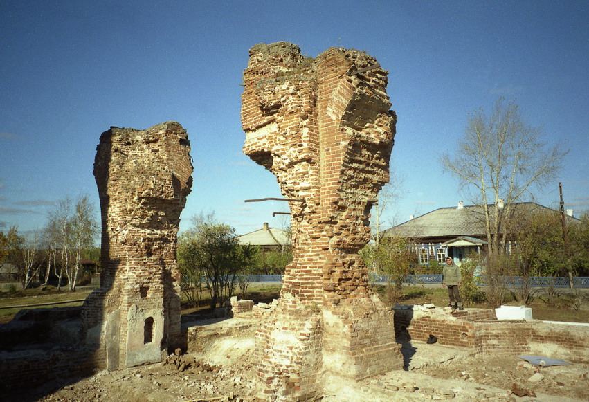 Разрушенный при советской власти храм Архангела Михаила в селе Меркушино